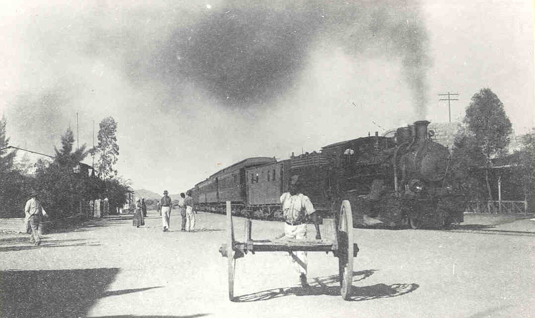 Karibib station ca. 1920